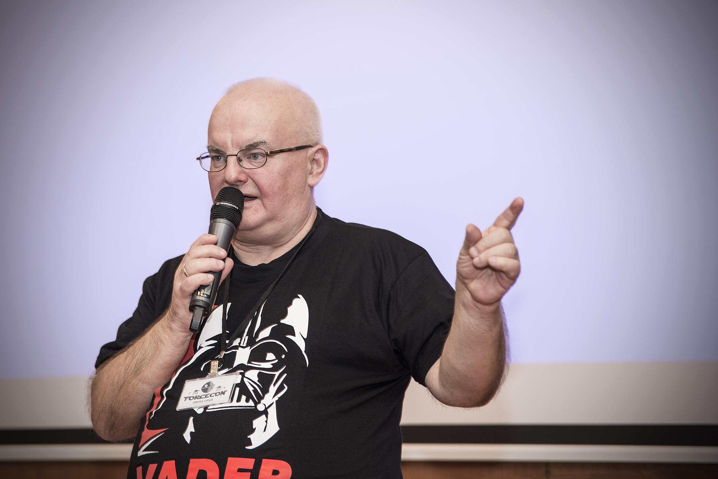 Jan Plata-Przechlewski, wykład na ForceConie, Wejherowo 2016.